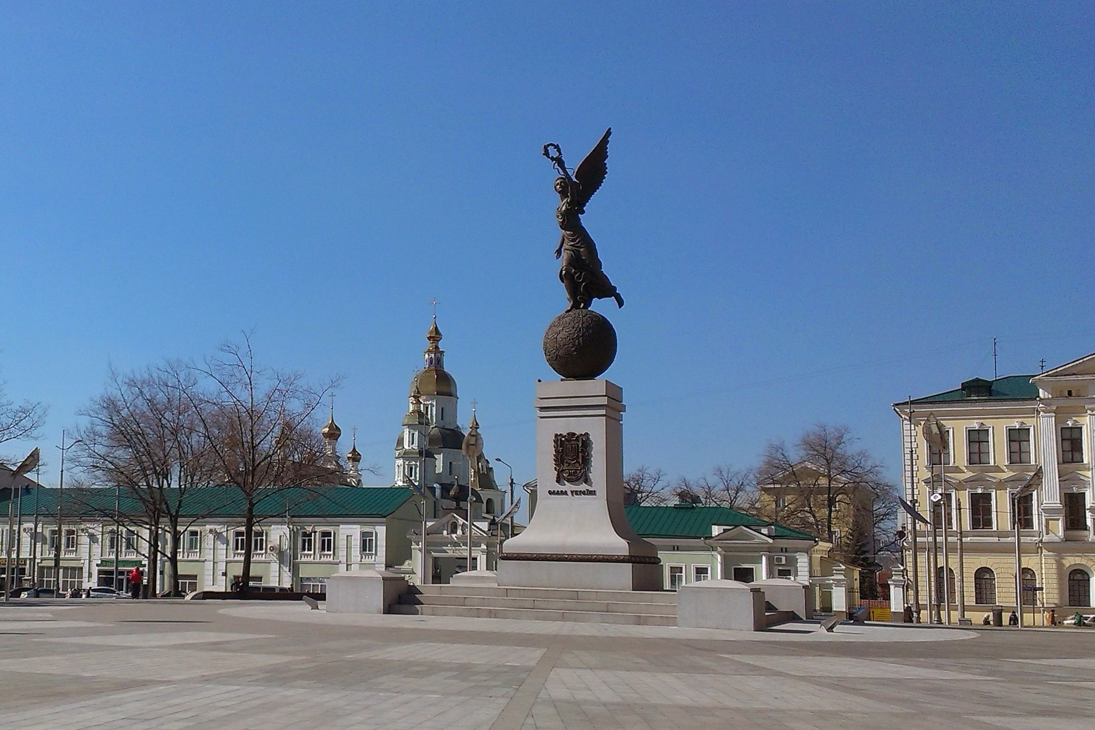 Shevchenkivs'kyi District, Kharkiv, Kharkiv Oblast, Ukraine